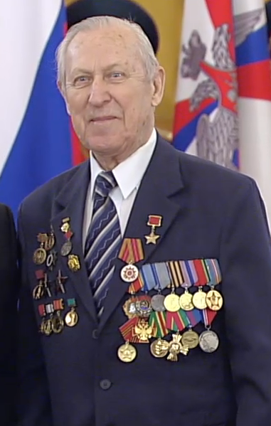 Герой Советского Союза Б. А. Рунов на церемонии вручения юбилейных медалей ветеранам Великой Отечественной войны в Кремле 20 февраля 2015 года.